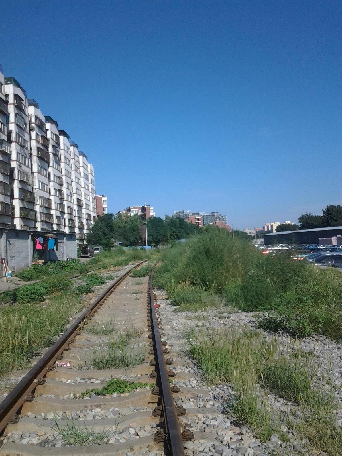 京门铁路五路火车站，1号股道终点方向。